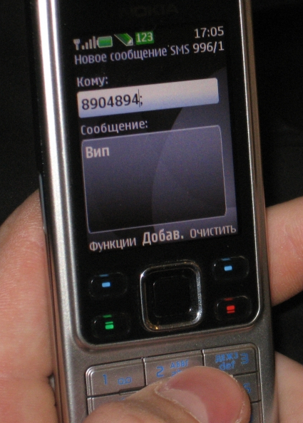 Человек пишет SMS на кнопочной клавиатуре сотового телефона. Оригинальное изображение кадрировано